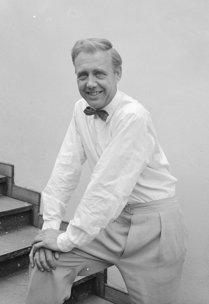 Rolf Sand er en norsk skuespiller.